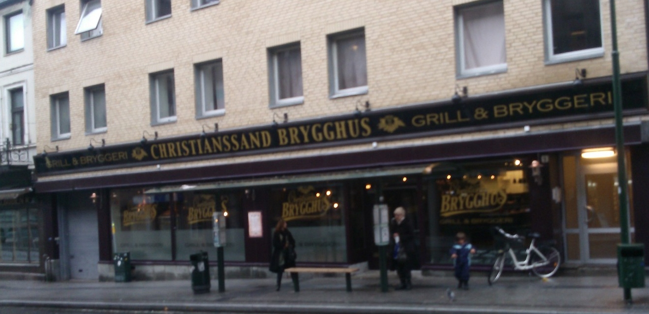 Christianssand Brygghus, Tollbodgata 9 i Kristiansand